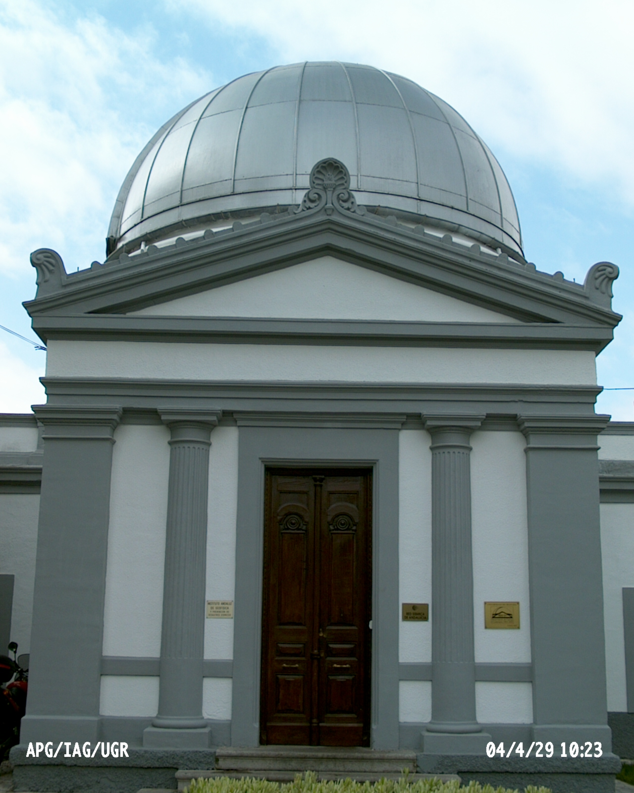 Instituto Andaluz de Geofísica y Prevención de Desastres Sísmicos, se encuentra en nuevo edificio con uso compartido junto al 112 Emergencias de la Junta de Andalucía, dentro del Campus de Cartuja de la Universidad de Granada, Granada, España. Página web del Instituto Andaluz de Geofísica